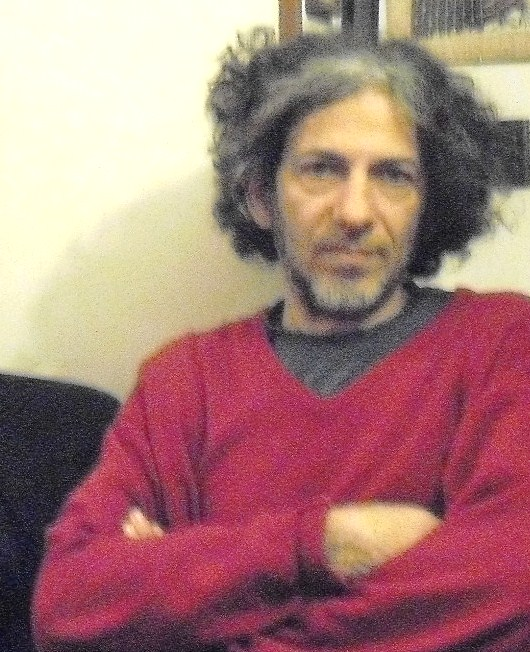 Fotografía del historietista argentino Juan Pablo González (Max Cachimba).